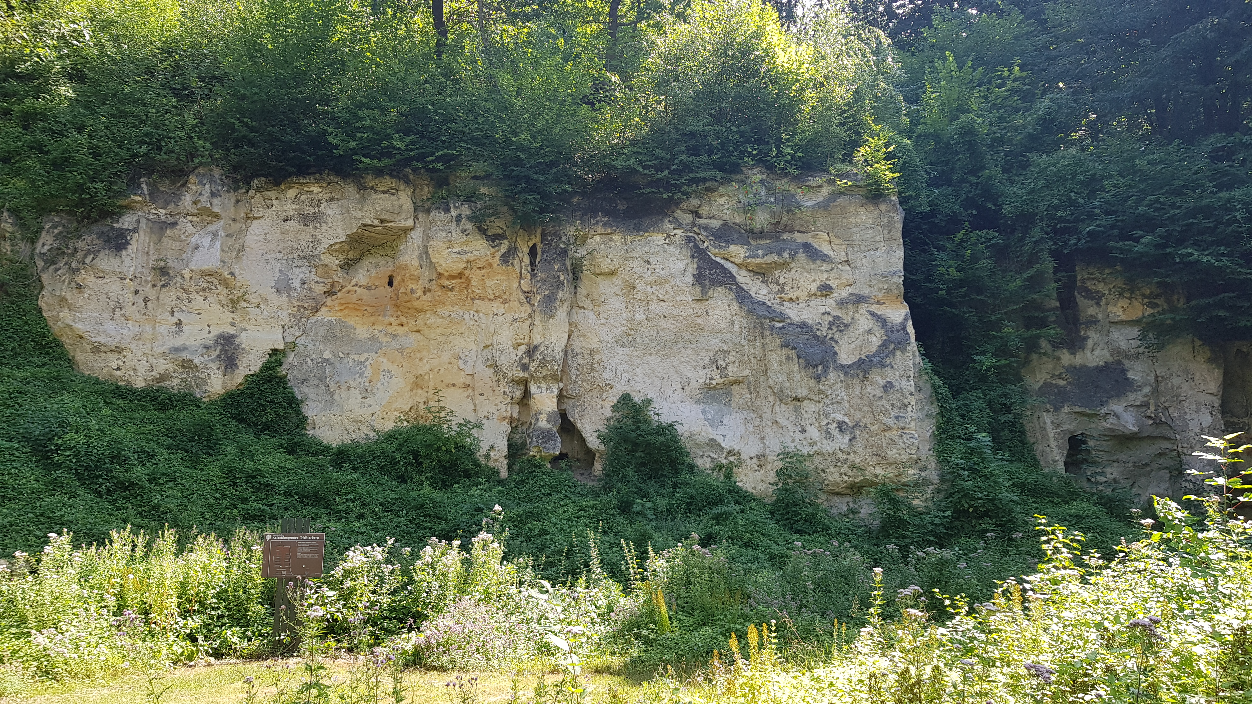 Geologisch Monument Groeve Trichterberg, Savelsbos, Gronsveld, Nederland